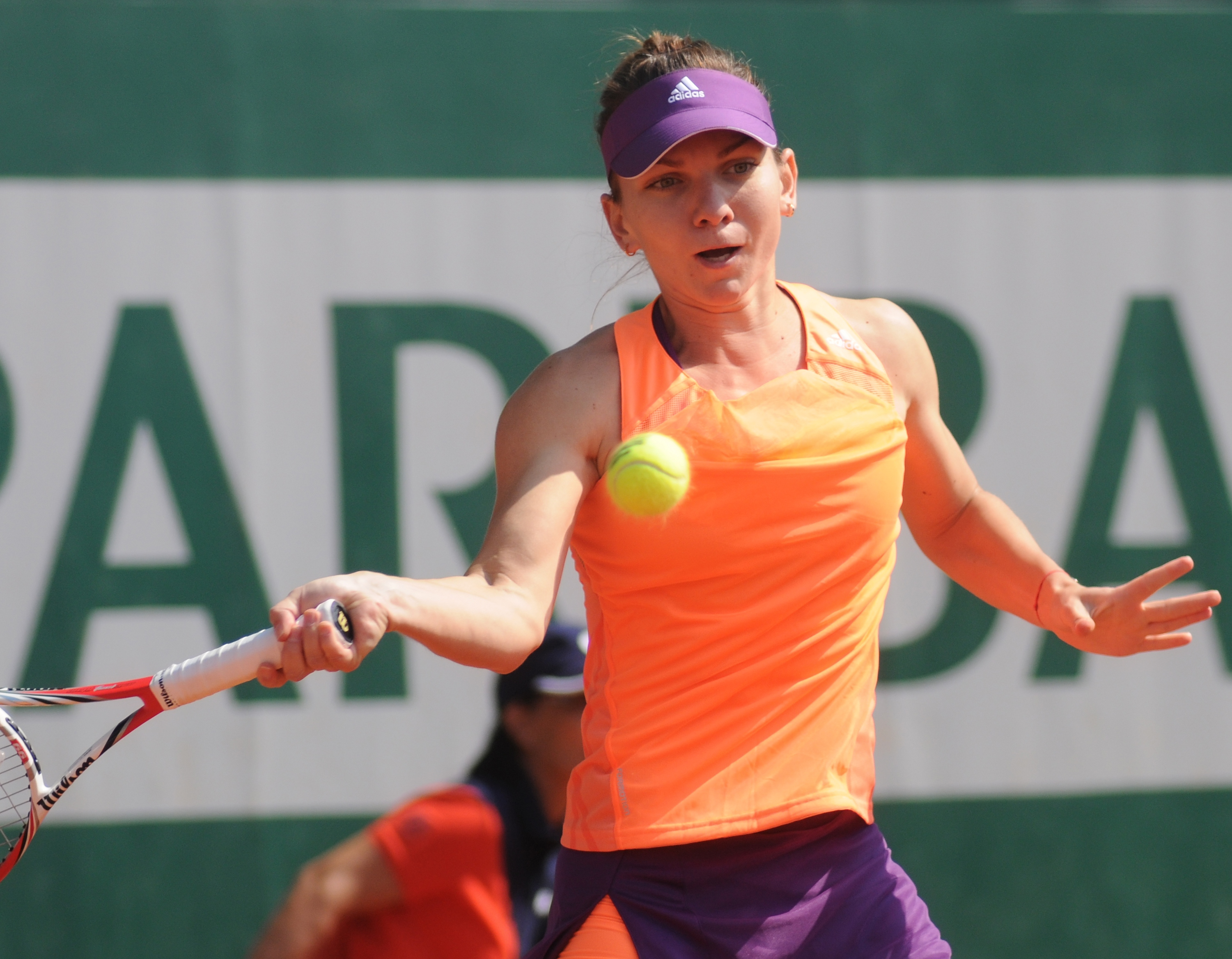 Simona Halep